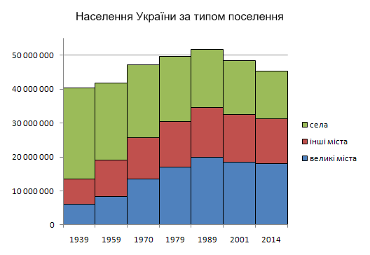 Population of Ukraine by types of settlement